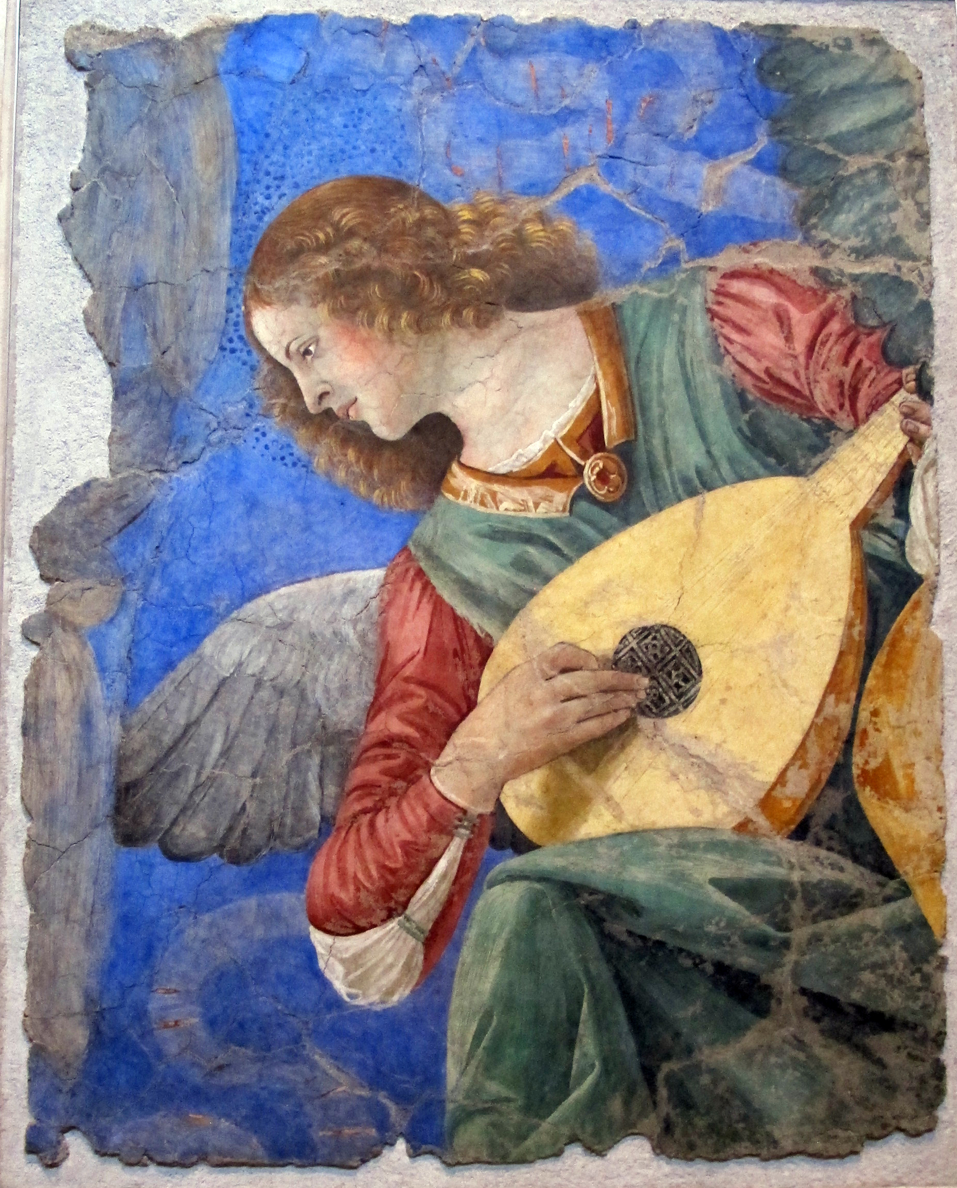 Pinacoteca Vaticana